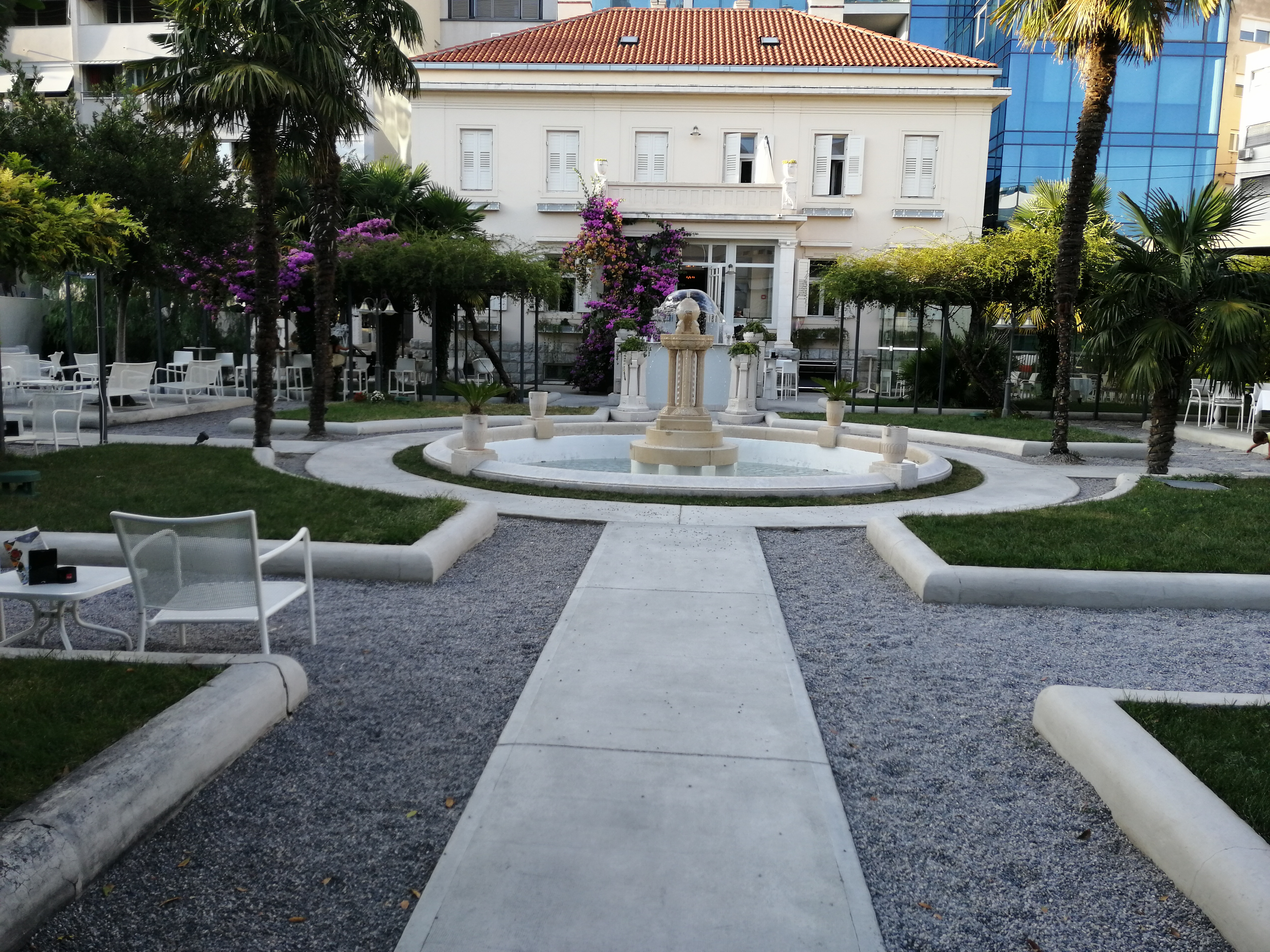 Projektant Vile Tončić, izgrađene 1922.g. je arhitekt Karel Beneš iz Praga, dok je sam vlasnik vile Kamilo Tončić osmislio konture vile i do starosti njegovao perivoj od preko 1000 m2 koji okružuje vilu. I jedan i drugi arhitektonski segment danas su pod zaštitom Ministarstva kulture Republike Hrvatske.